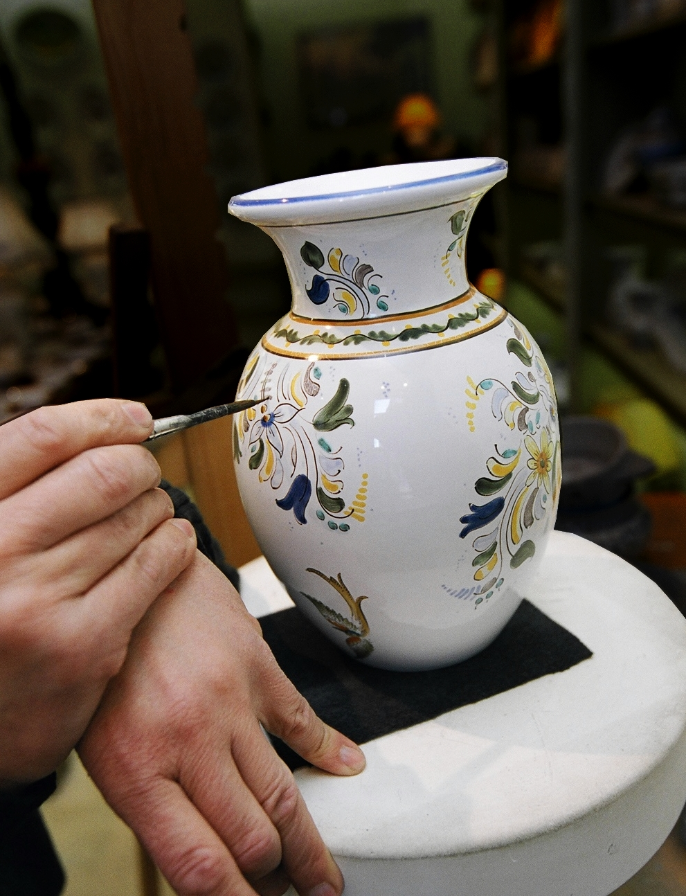 Faïencier Bernard à Nevers (58). Cliché publiable moyennant mention du crédit de la Ville de Nevers.